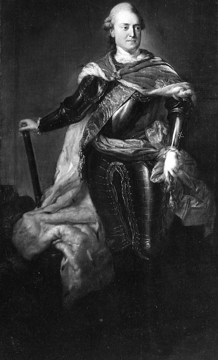 riedrich August III., der Gerechte (1750-1827), Kurfürst von Sachsen 1763-1806, als Friedrich August I. König von Sachsen 1806-1827